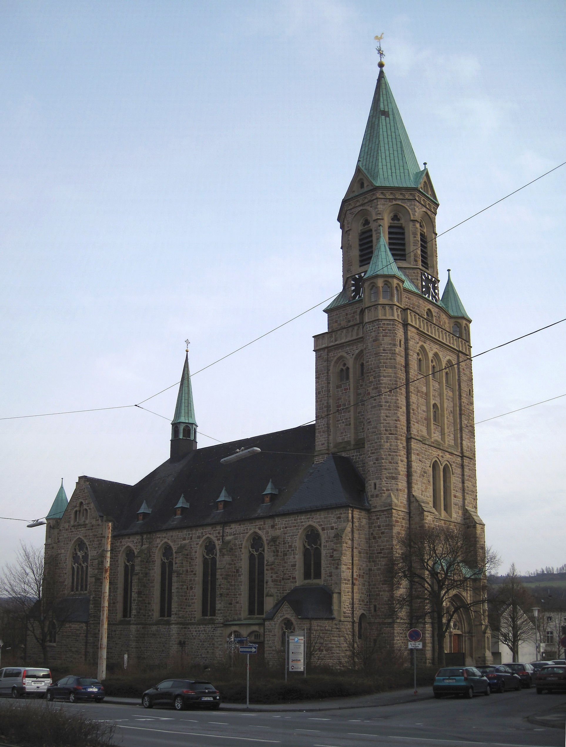 Dom St. Kilian in Letmathe.